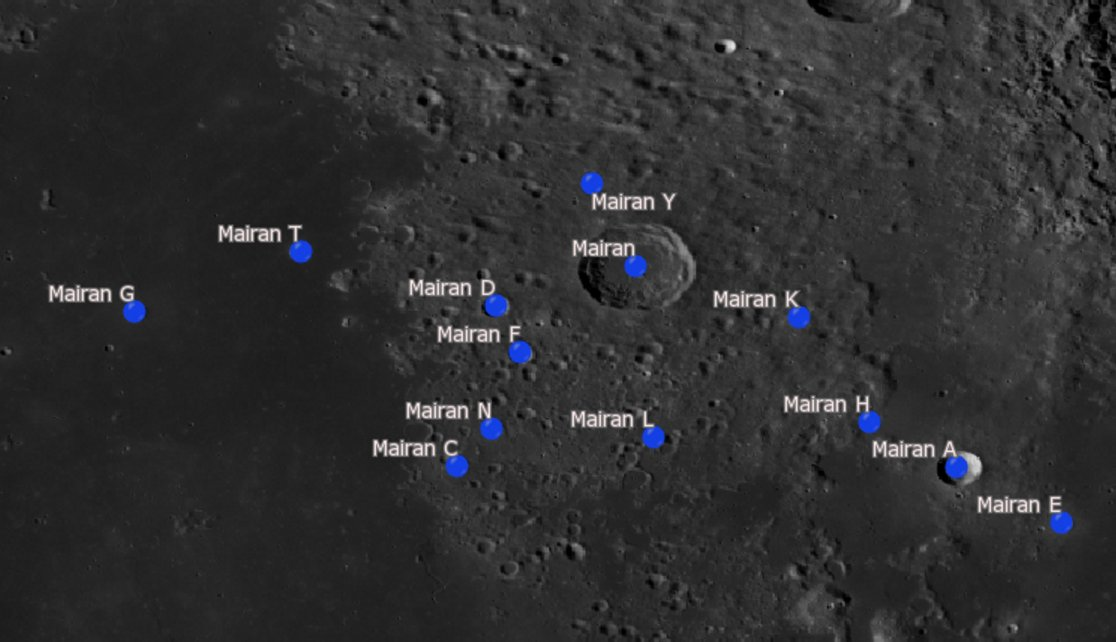 Cráter lunar Mairan. Cráteres satélite. (Imagen LRO)